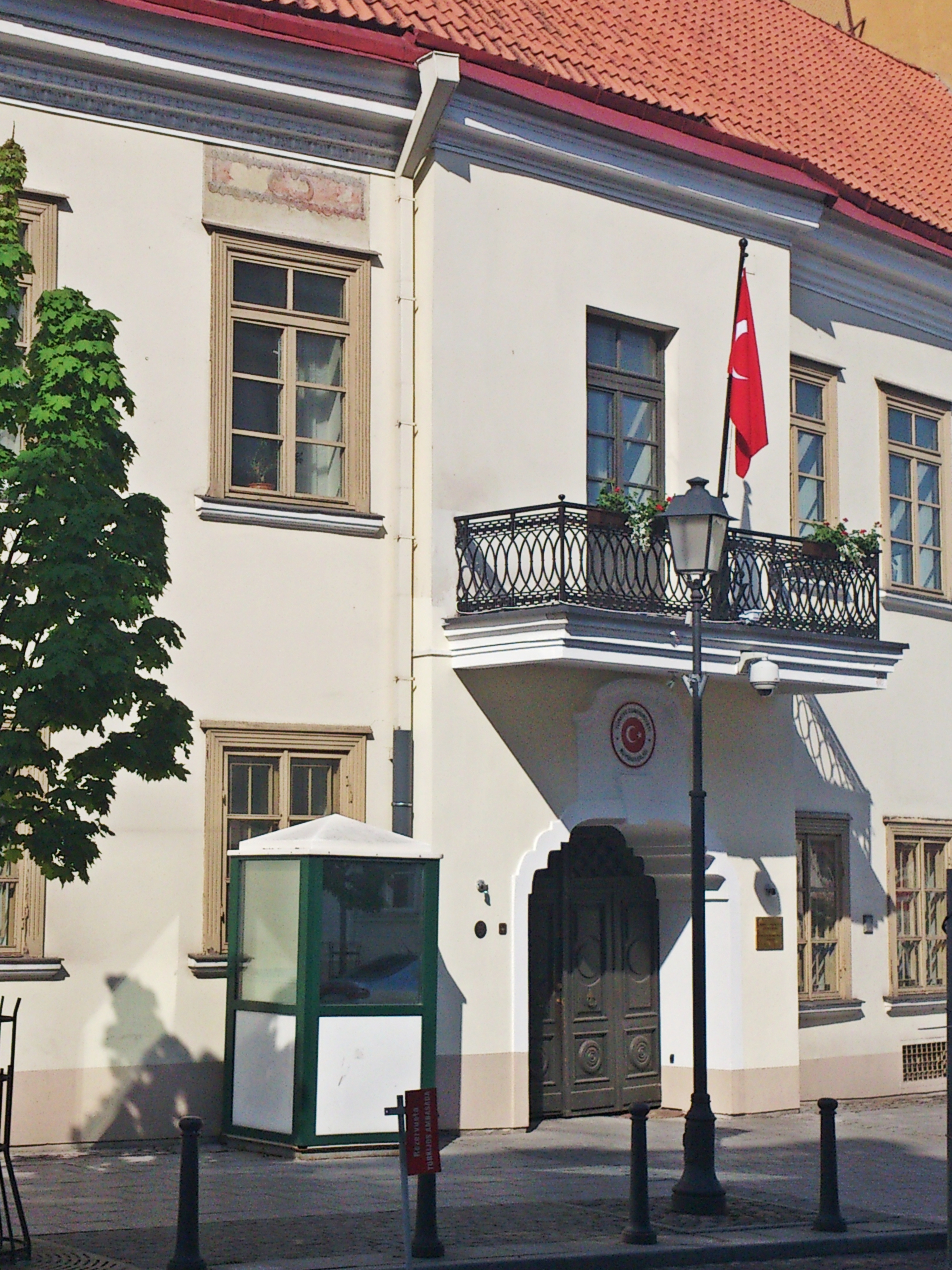 Посольство Турции в Литве